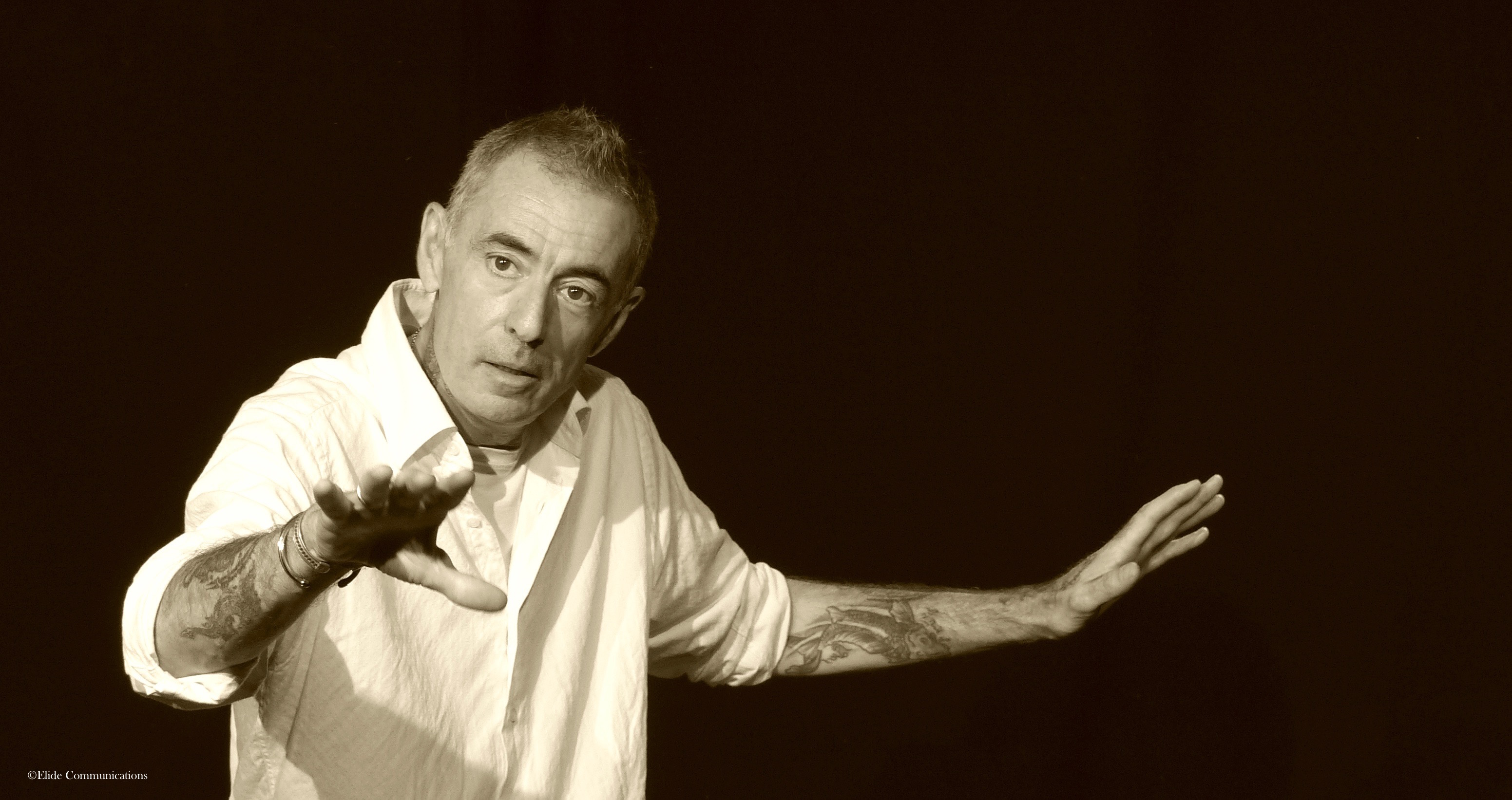 Manuel Pratt, festival Off Avignon 2016, La Valse des hyènes au théâtre de la tâche d'encre.